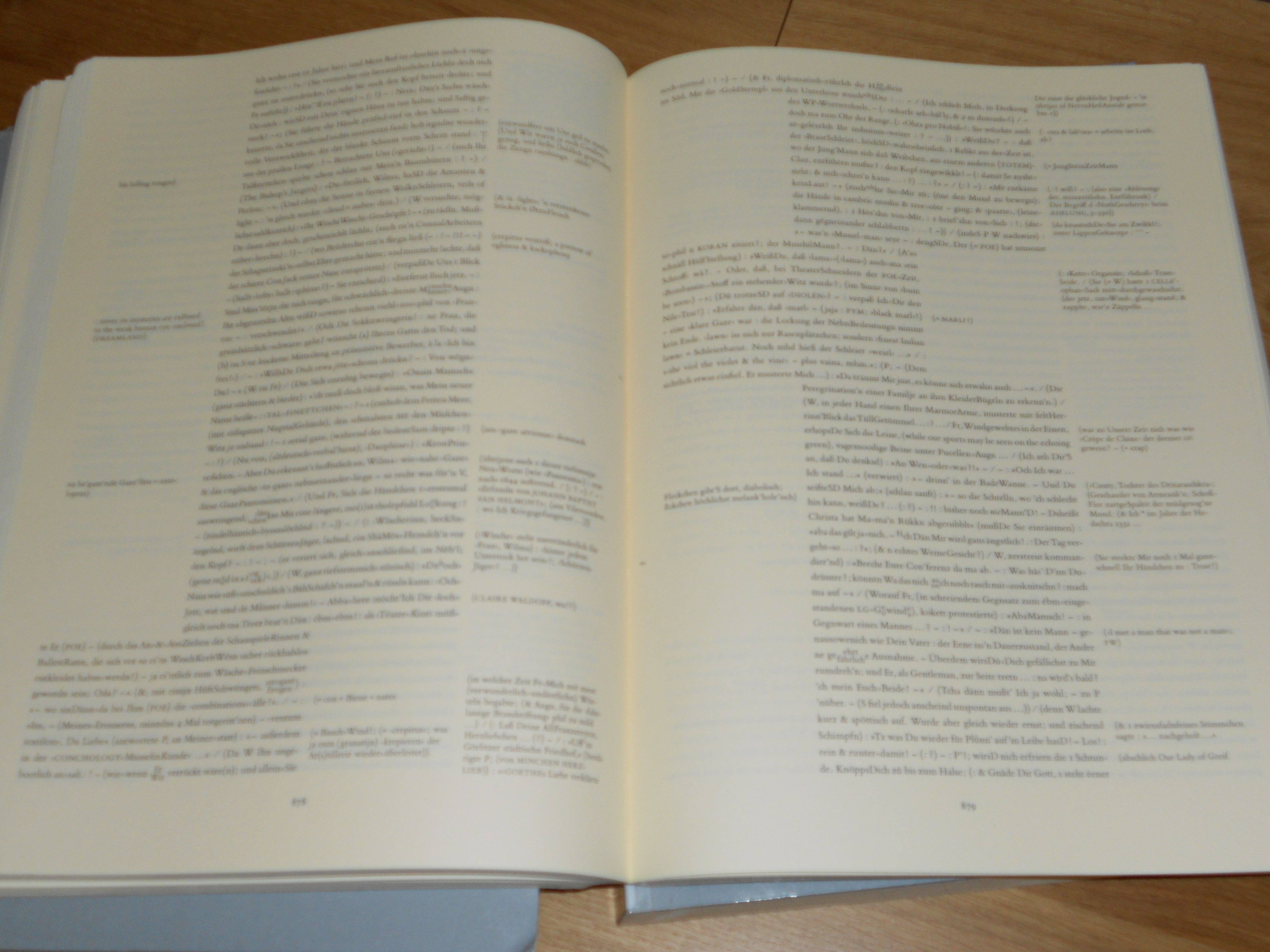 Satzspiegel der Taschenbuchausgabe von Arno Schmidts Zettel's Traum, Suhrkamp 2010, Text unleserlich